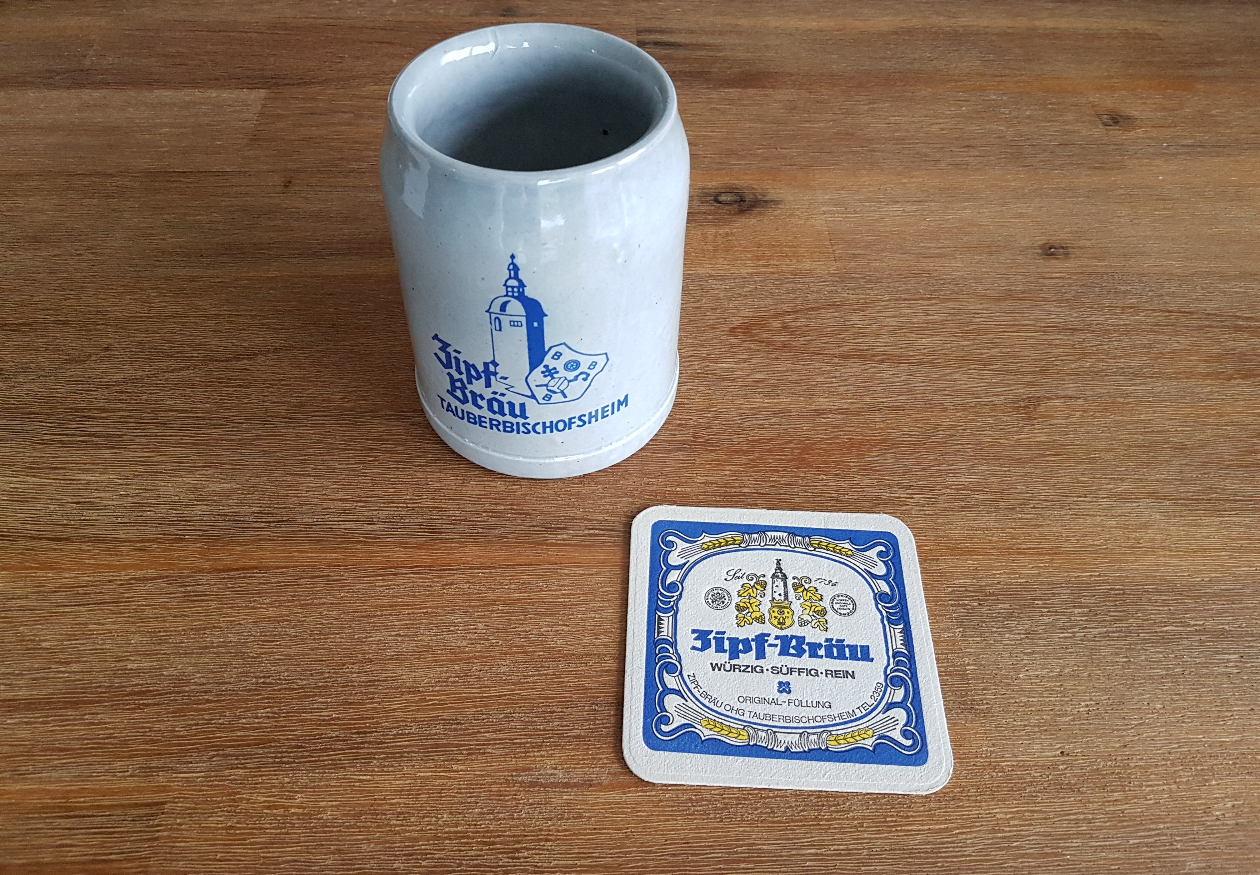 Zipf-Bräu Tauberbischofsheim Logo Bierkrug Bierdeckel